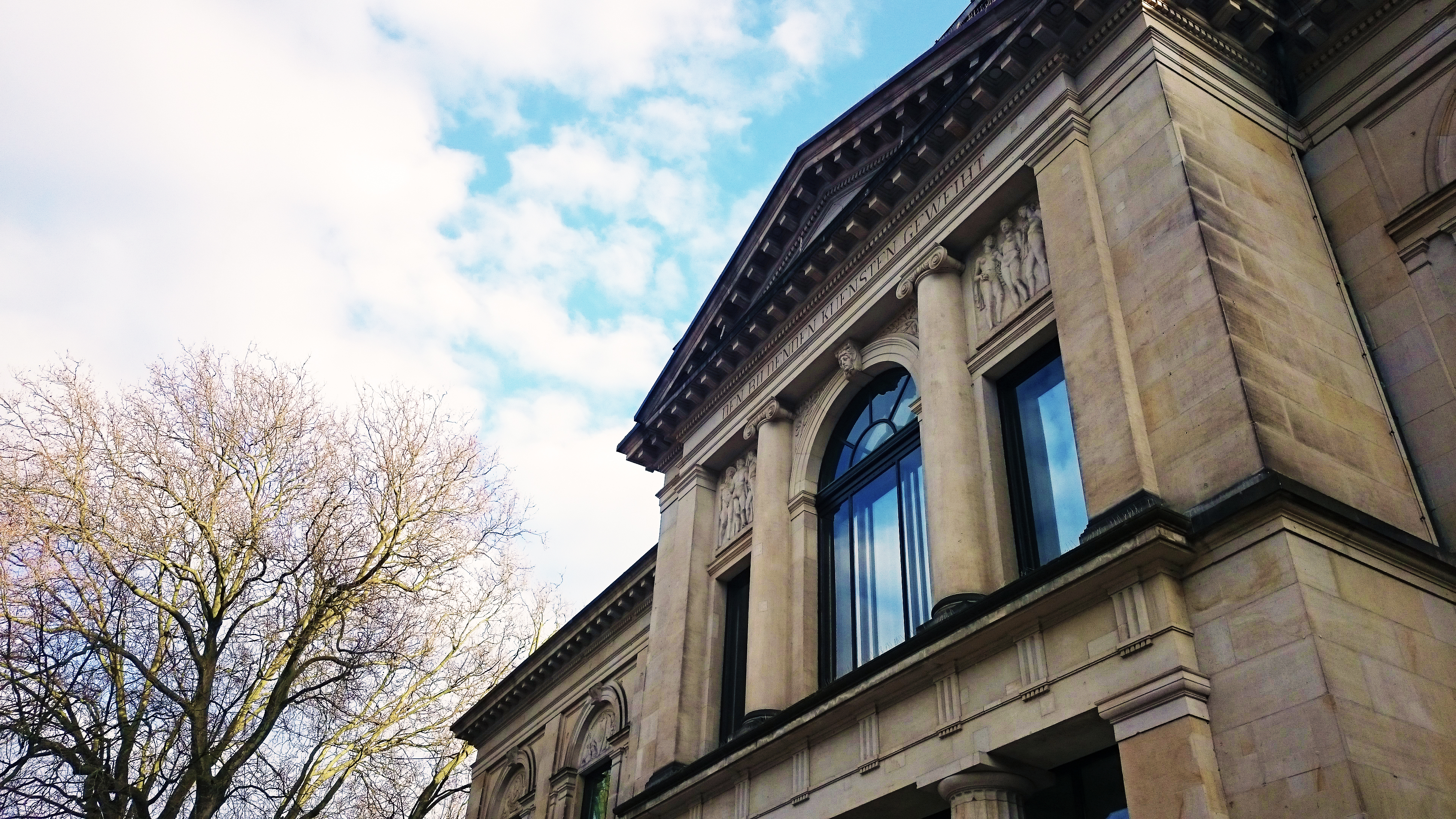 Das abgebildete Objekt ist ein geschütztes Kulturdenkmal in der Freien Hansestadt Bremen, mit der Nr. 0084 beim Landesamt für Denkmalpflege registriert.